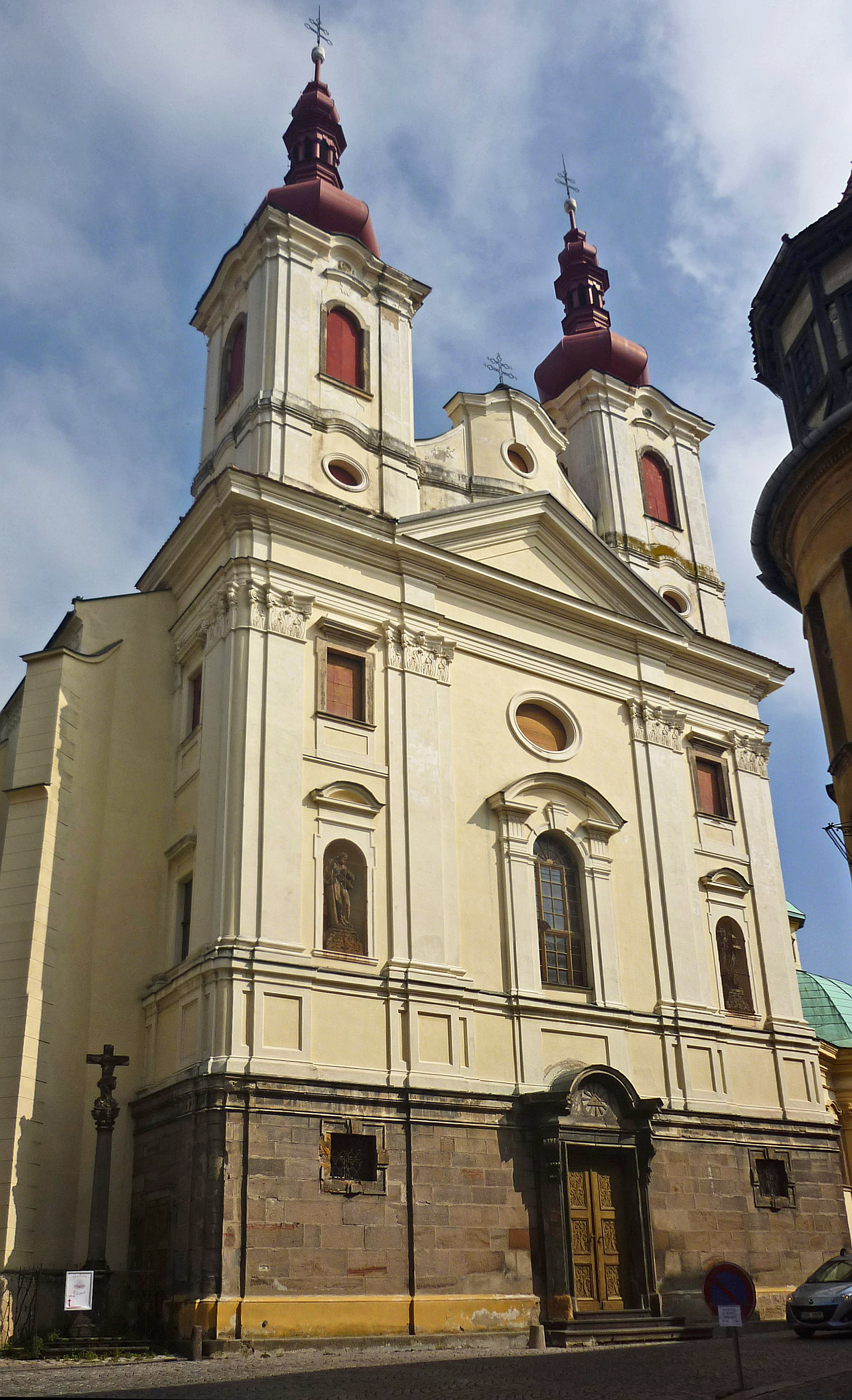 Doppelturmfassade der Dekanatskirche in Saaz/Žatec